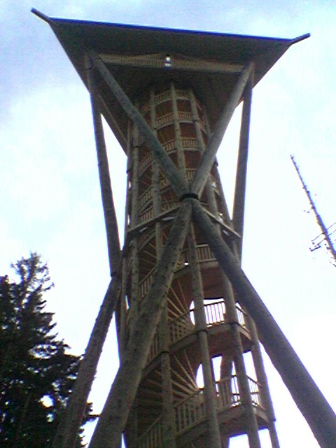 Wil Tower - Turo de Wil